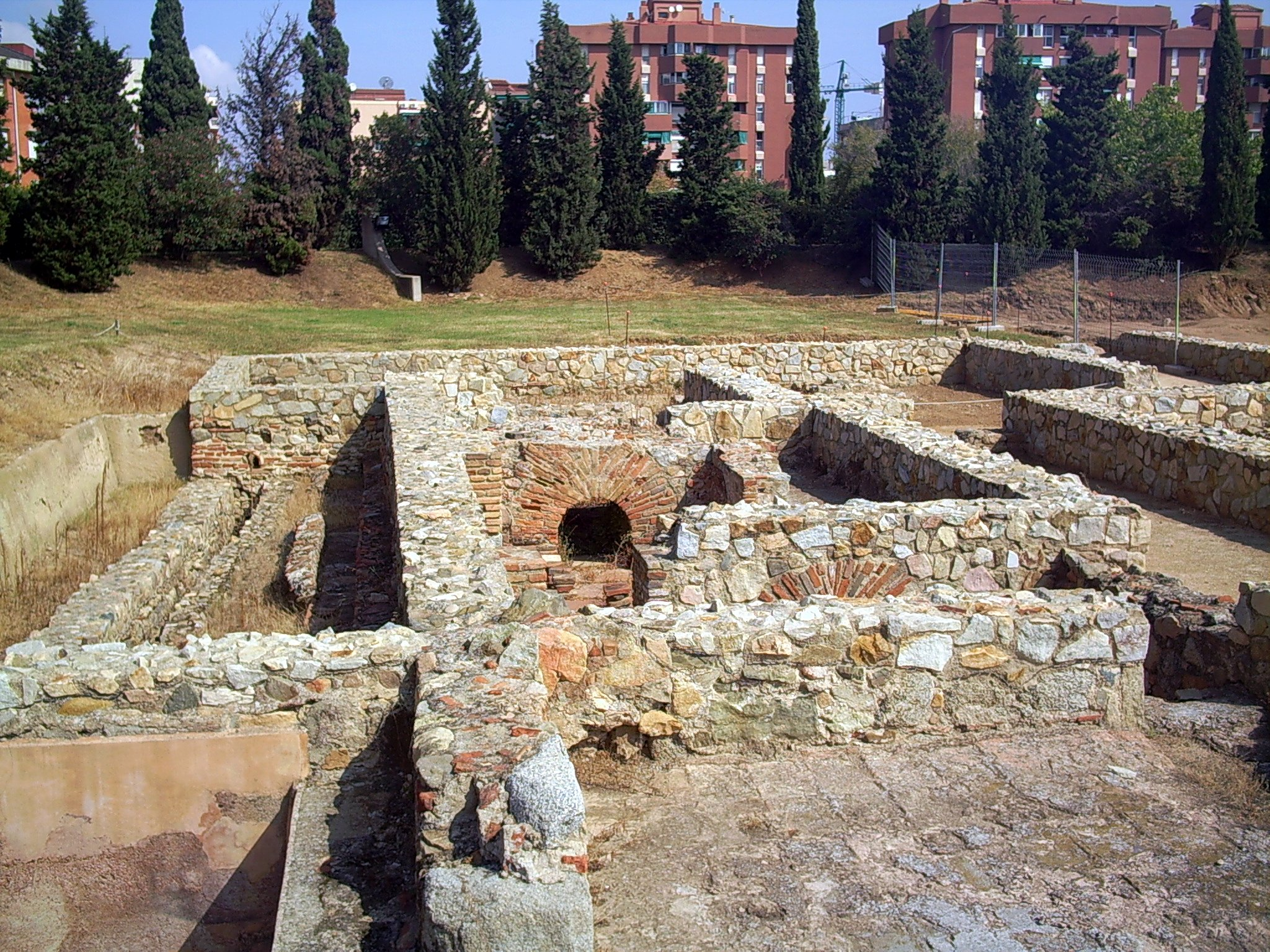 Forn dels banys calents o caldarium, l'arc de maons que es pot apreciar, de la vil·la romana de Can Llauder. Mataró, el Maresme, (Catalunya).